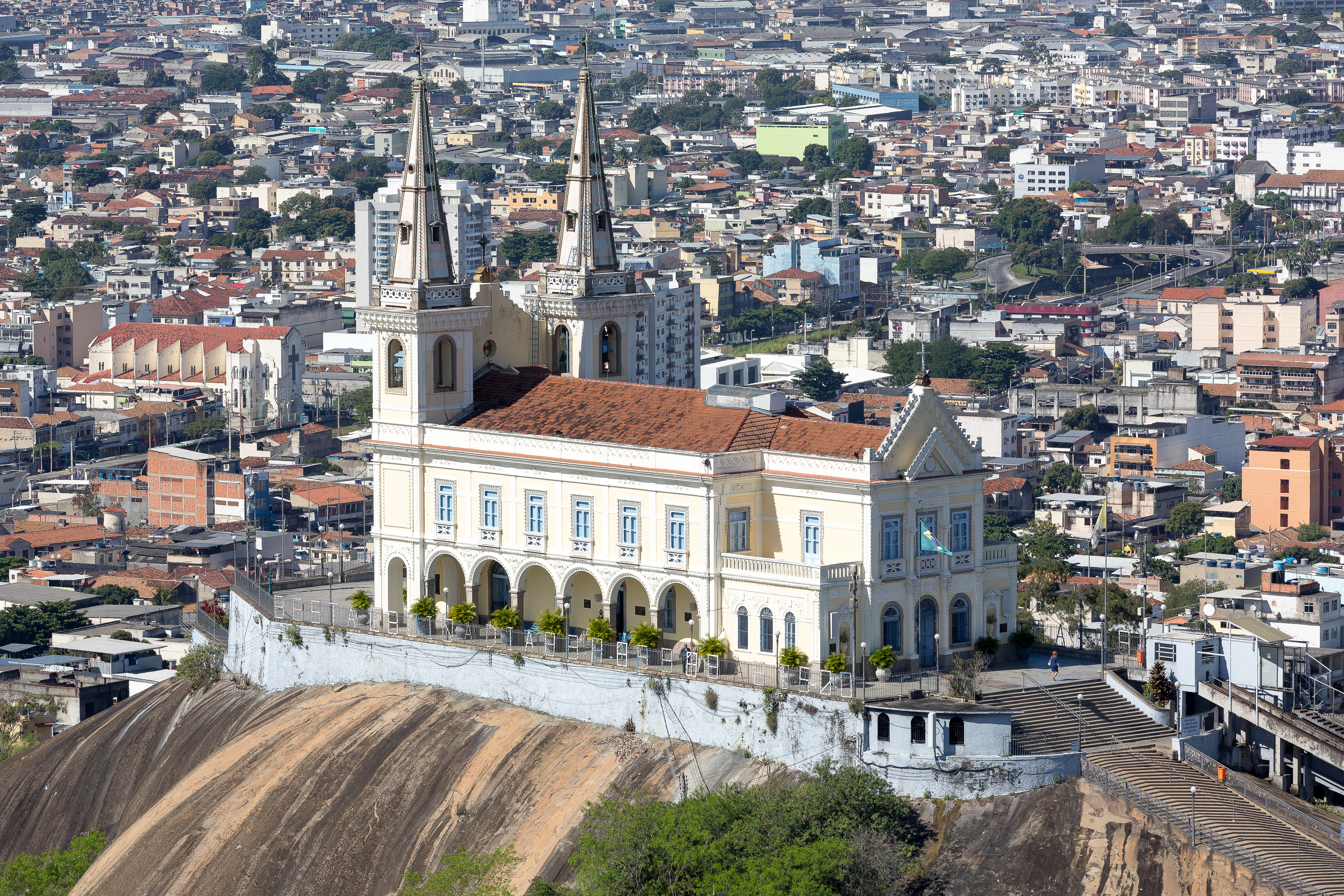 Imagem aérea da Igreja da Penha